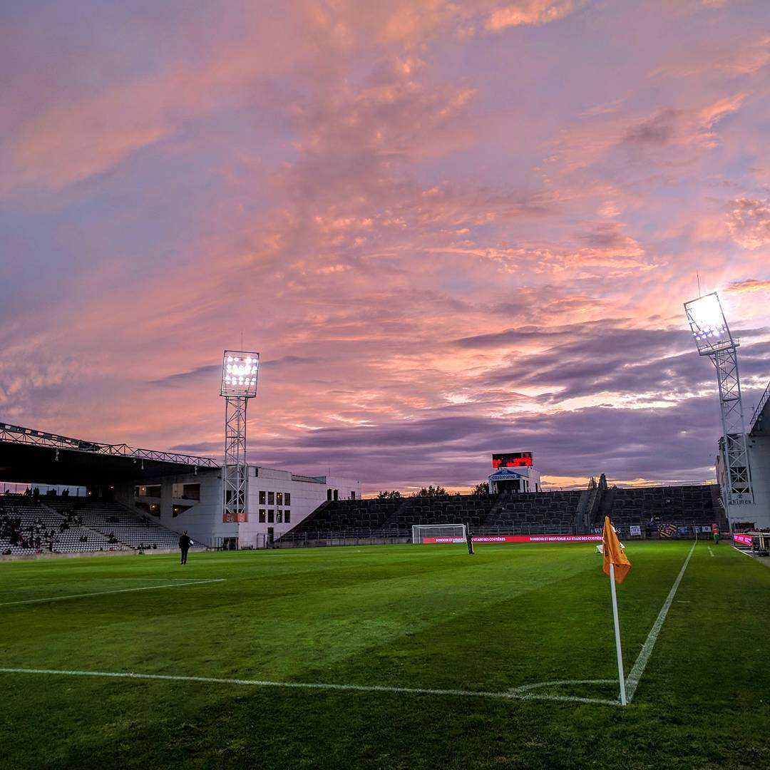 Stade des Costières - Octobre 2017